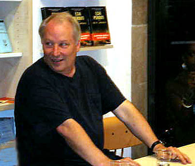 Joe R. Lansdale a Roma nel 2006. Per gentile concessione di Francesco Grossi